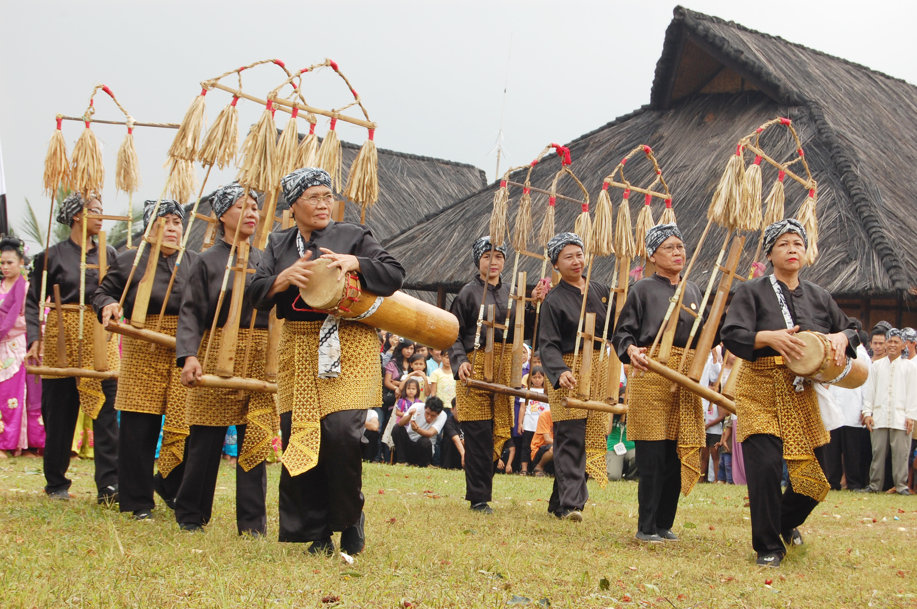 Seren Taun adalah perayaan tradisional masyarakat Bogor, yang terletak di kaki Gunung Salak, yang diselenggarakan setiap tahun selepas Tahun Baru Hijriah, untuk menyatakan rasa terima kasih warga kepada Tuhan YME untuk hasil panen yang melimpah. Para ibu rumah tangga dilibatkan dalam acara ini. Foto ini diambil pada tahun 2009.